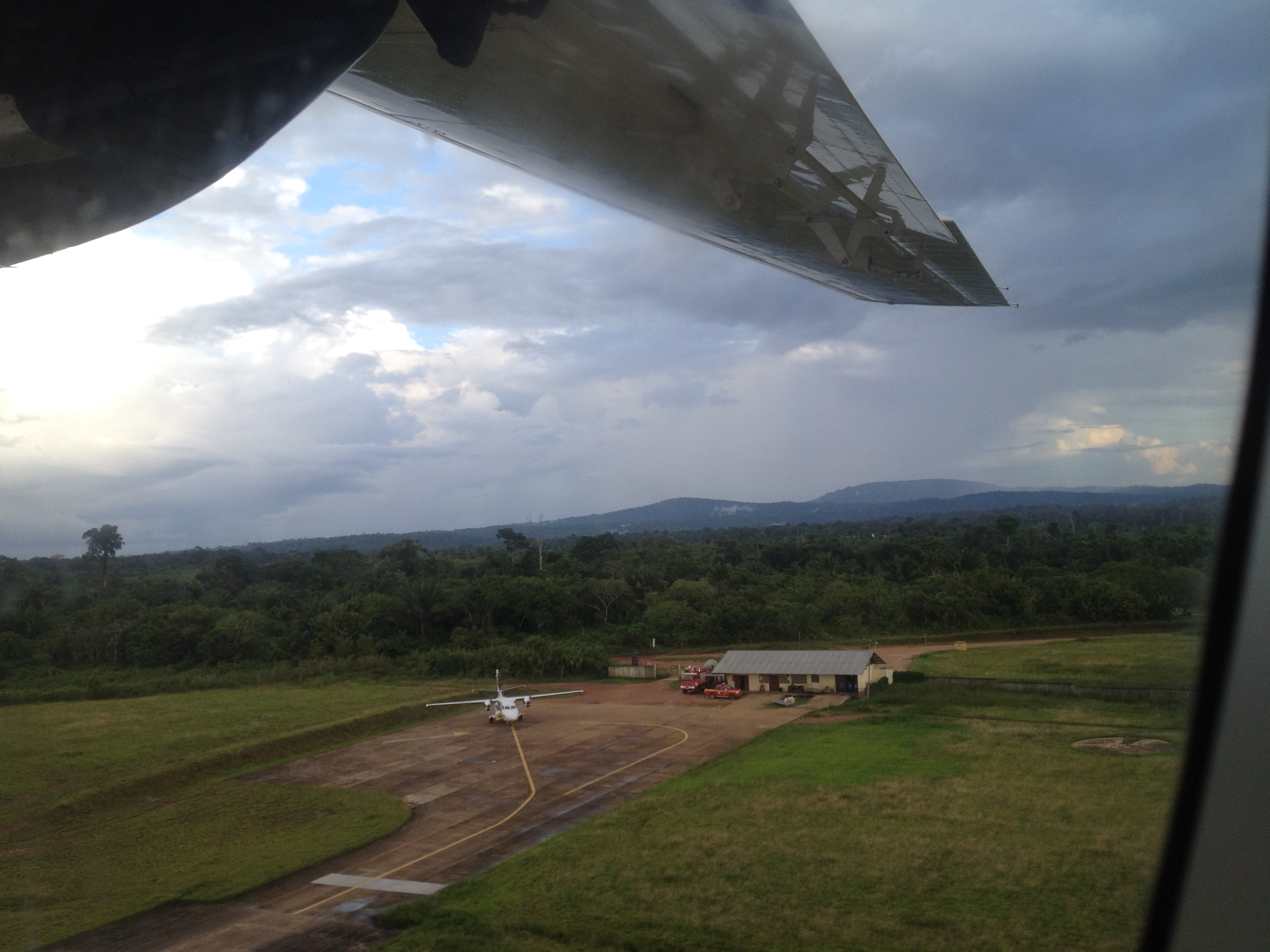 Aéroport de Maripasoula - vue aérienne